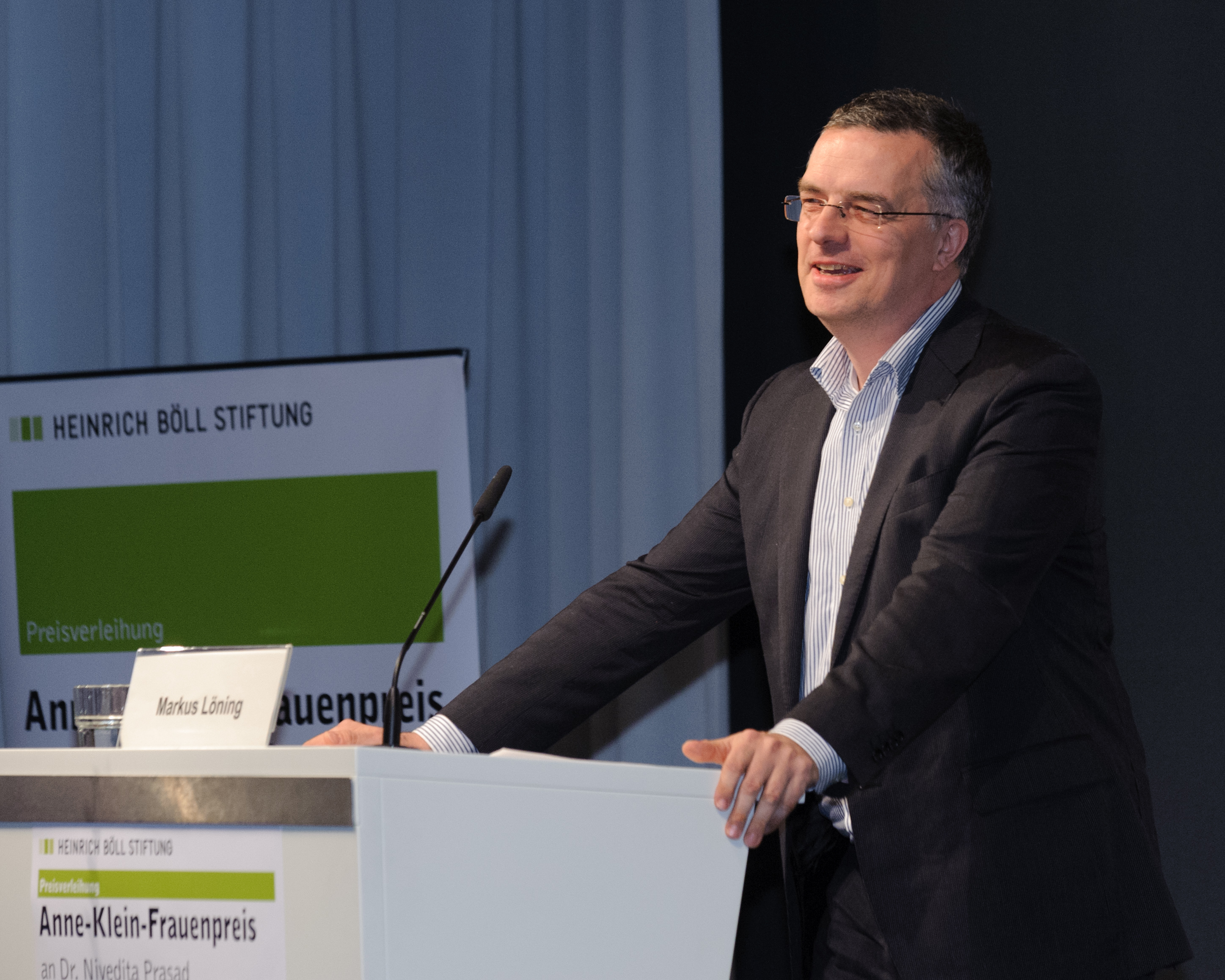 Grußwort: Markus Löning (Beauftragter der Bundesregierung für Menschenrechte und Humanitäre Hilfe) Anne-Klein-Frauenpreis 2012 Mit fast 400 Gästen war die Verleihung des ersten Anne-Klein-Frauenpreises an die Menschenrechtsaktivistin Dr. Nivedita Prasad ein voller Erfolg. Die Geehrte nutzte die Veranstaltung nicht nur, um langjährigen Weggefährtinnen und Unterstützerinnen zu danken, sondern machte auch auf bestehende Missstände aufmerksam.